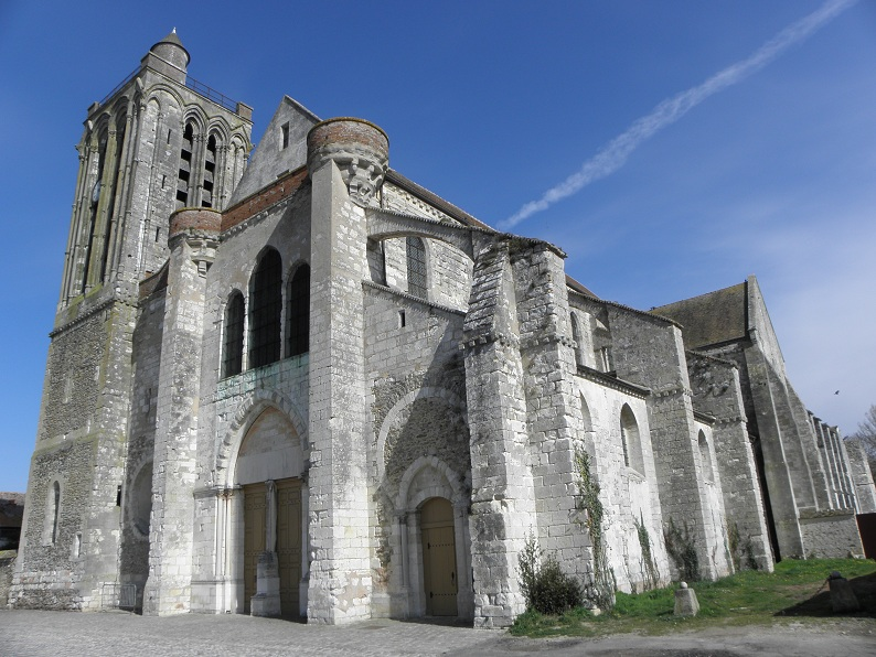 Façade ouest et flanc sud de la collégiale Saint-Martin de Champeaux (77).